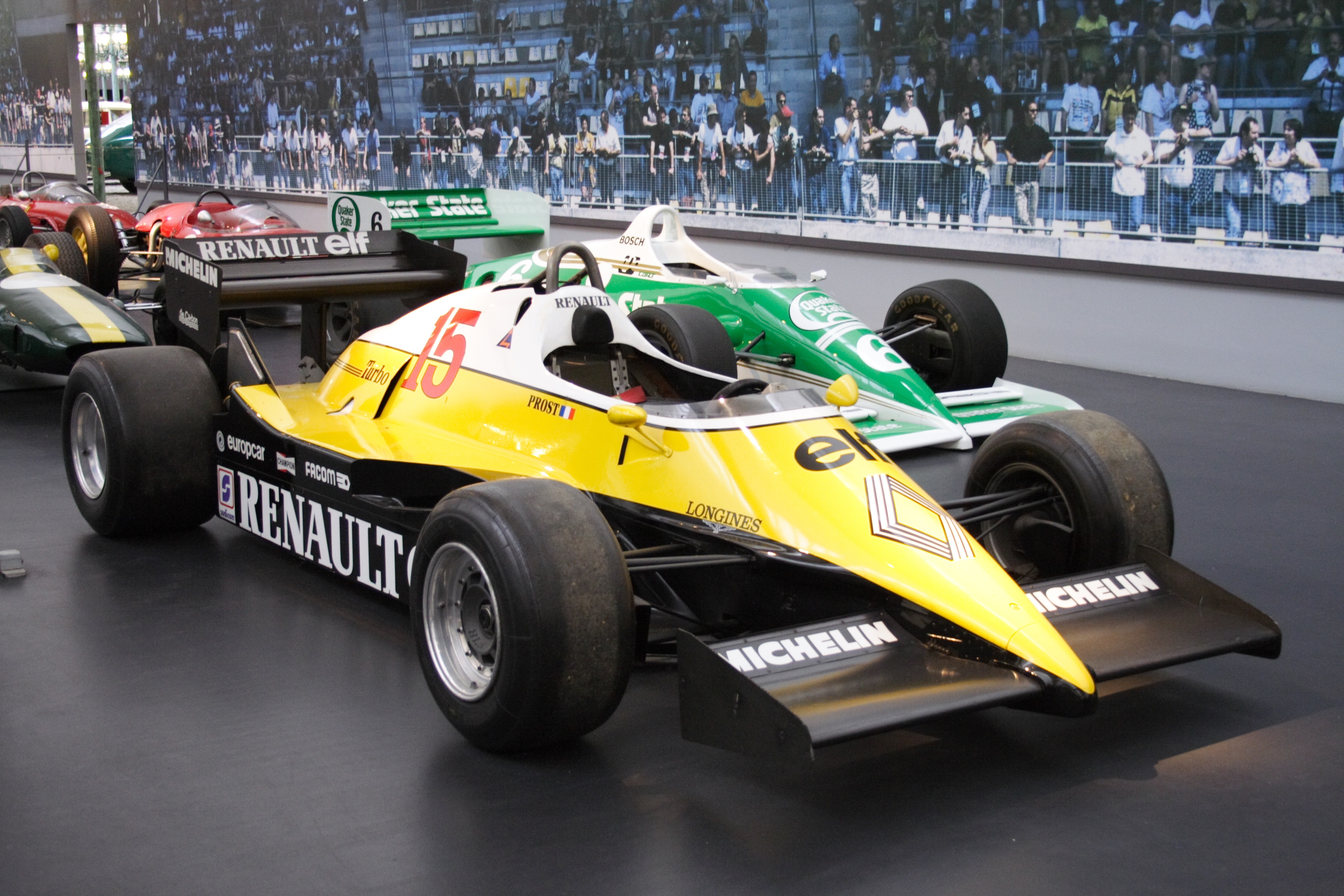 Renault RE40 1983 at the Musée National de l'Automobil(Mulhouse, France)